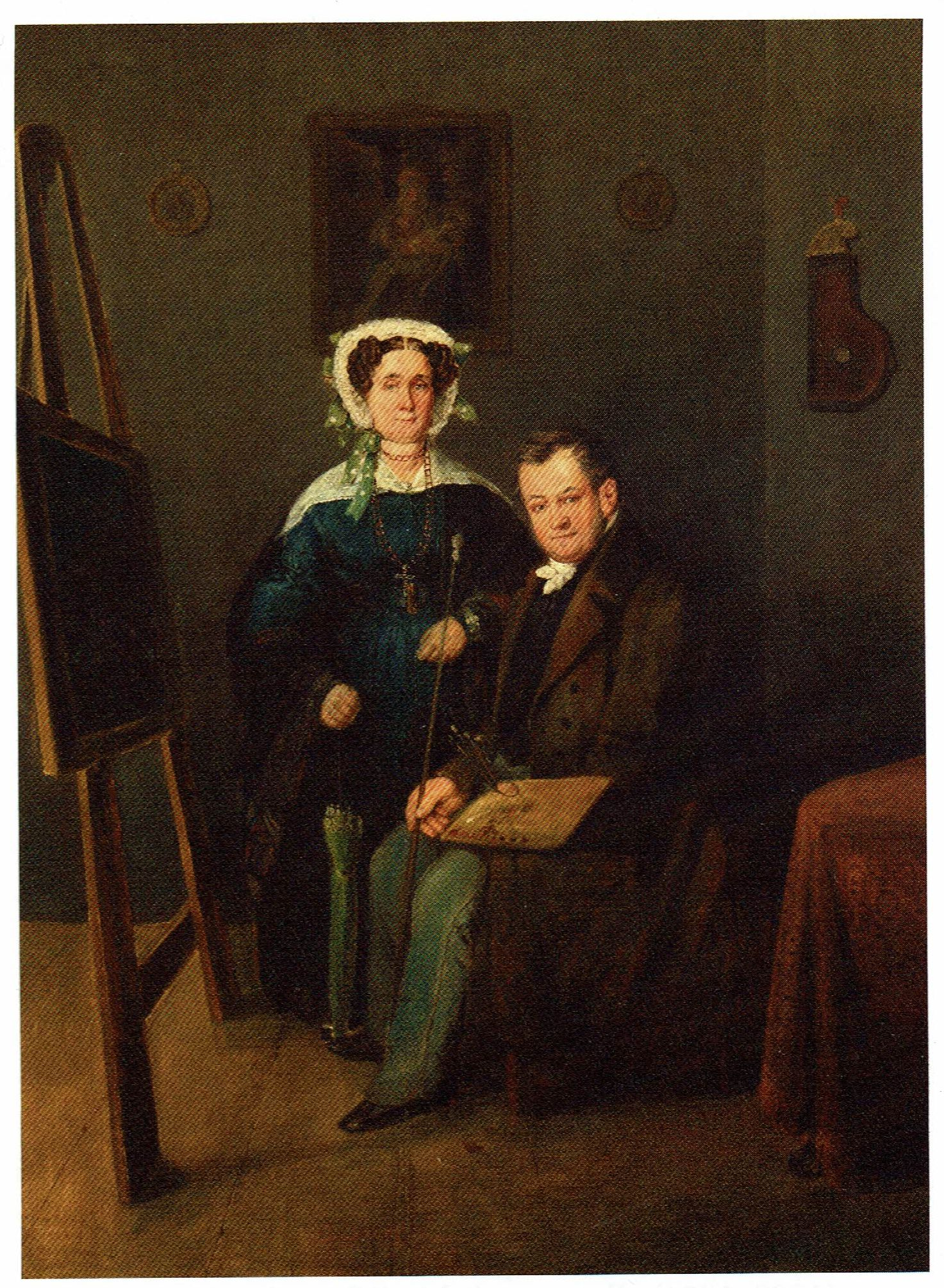 Selbstbildnis Johann Baptist Pflug mit Ehefrau Theresia